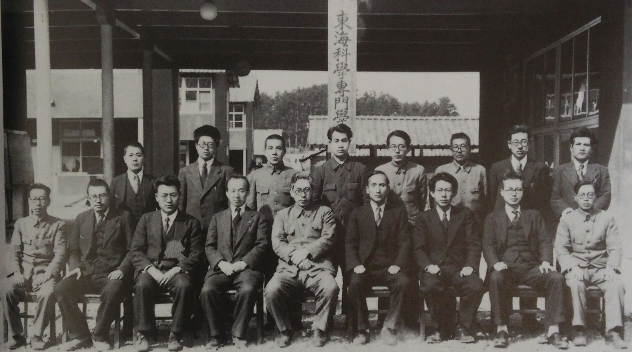 東海科学専門学校駒越校舎の教師陣。前列中央から右へ松前重義理事長、高田三郎校長、牧野不二雄教授。